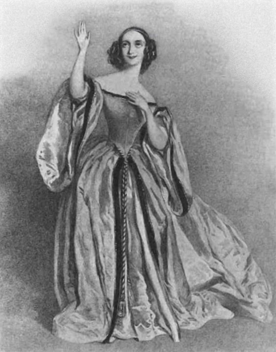 Eerste zangeres Lucia di Lammermoor